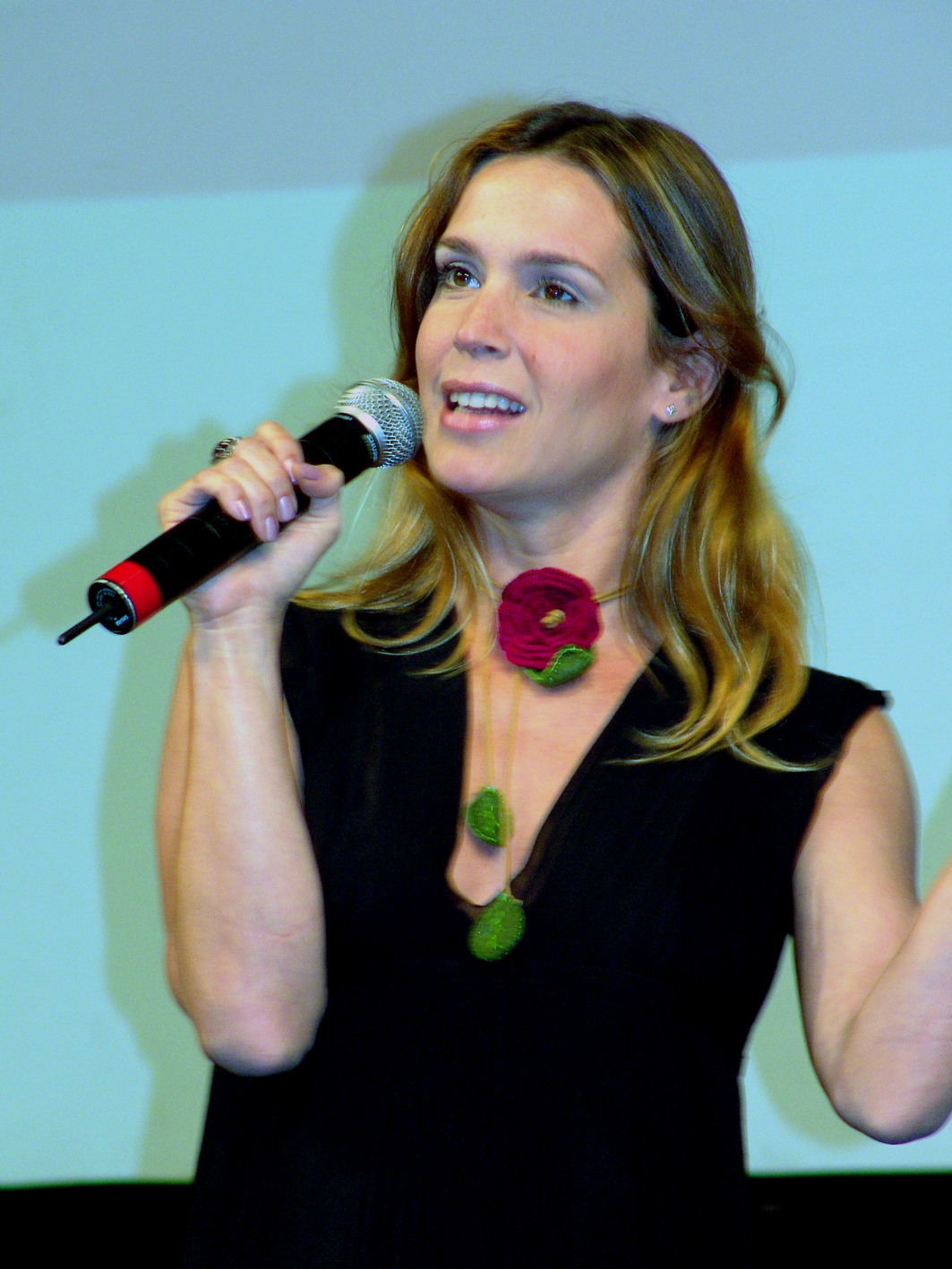 Vanessa Lóes